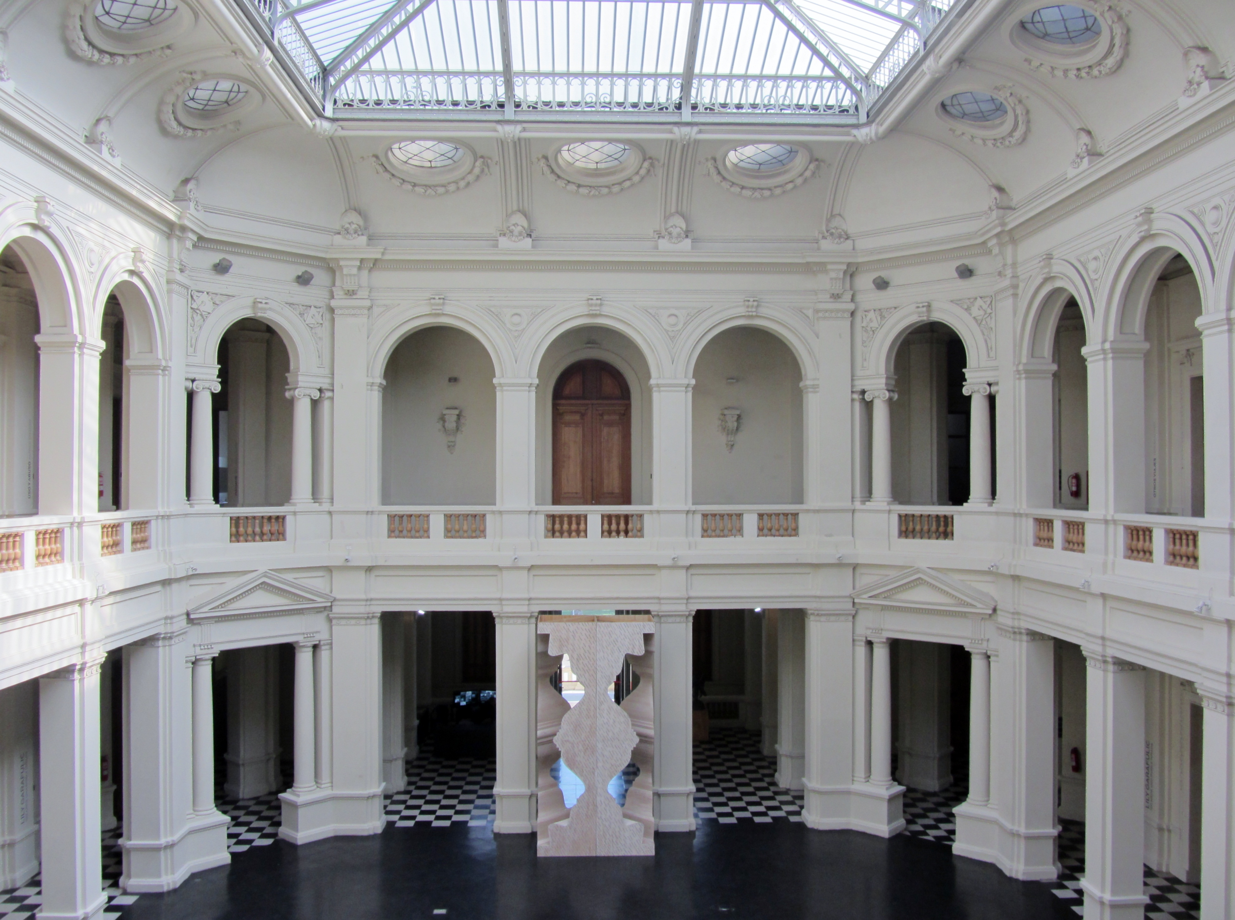 Interior (con parte del techo) del Museo de Arte Contemporáneo de Santiago.